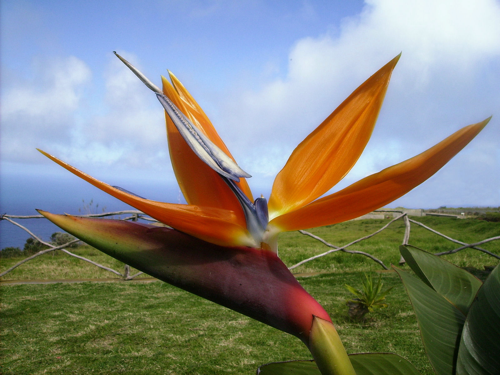 Strelitzia reginae in Madeira